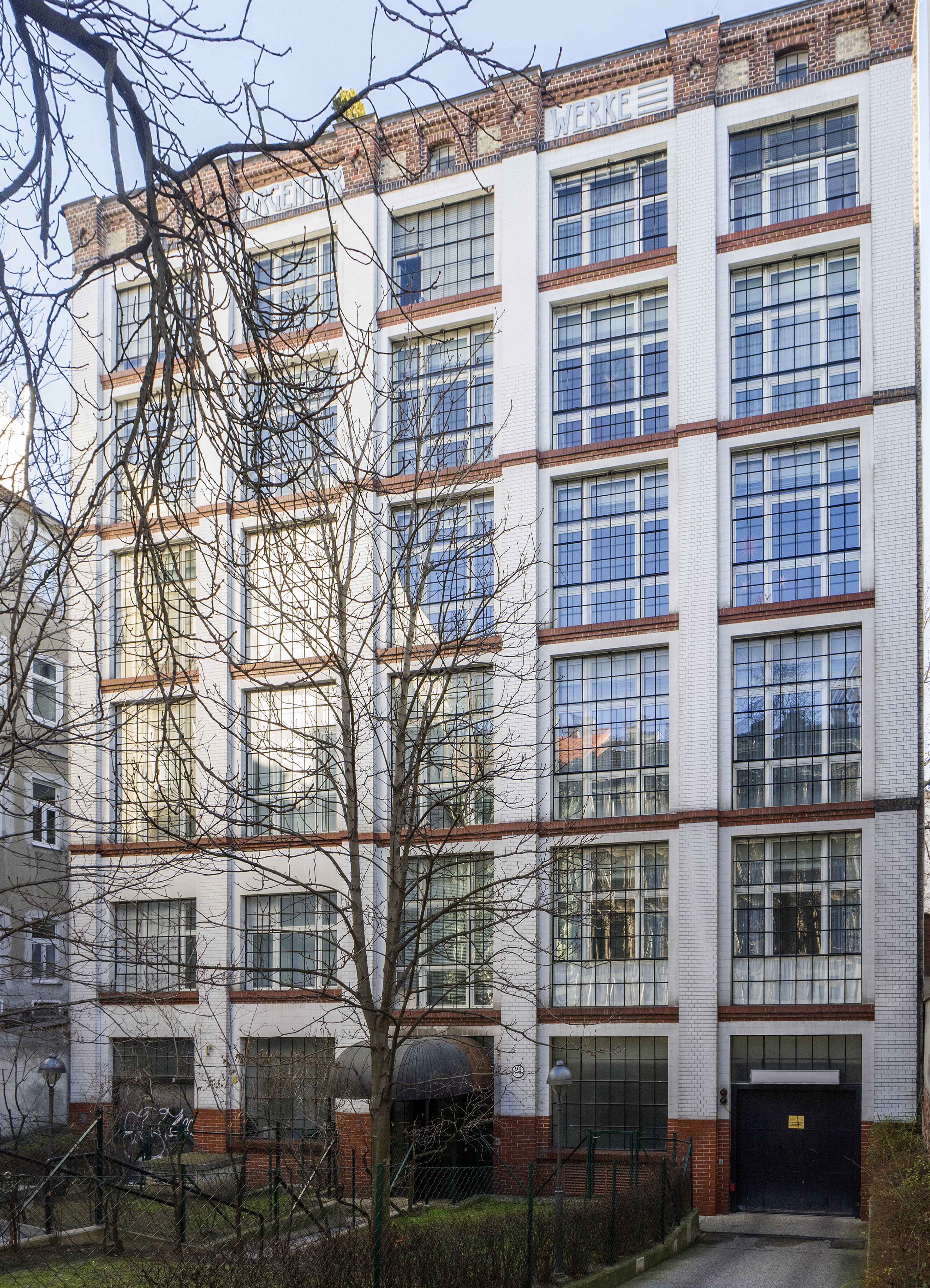 Fabriksgebäude, ehem. Argentor-Werke